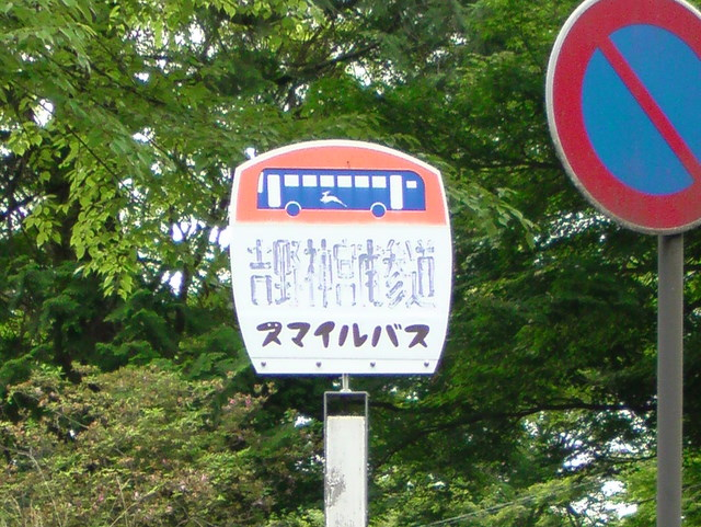 奈良県吉野郡吉野町スマイルバス停標識